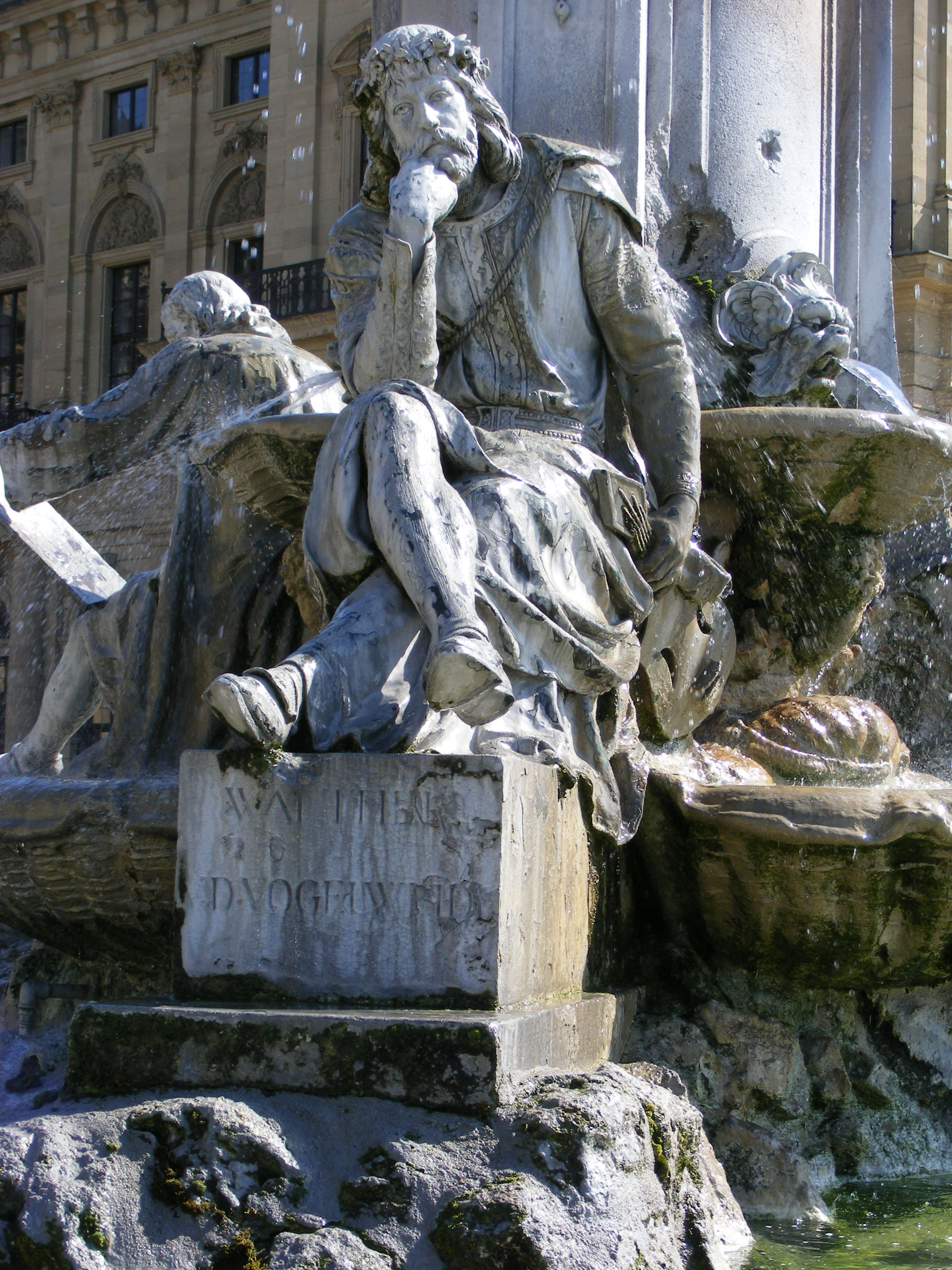 Würzburg - Frankoniabrunnen. Detail: Walther von der Vogelweide